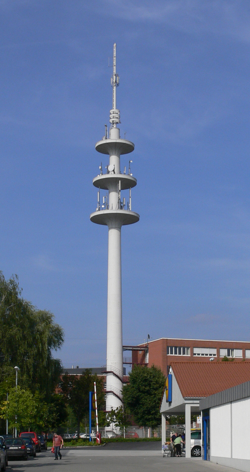 Ravensburg, Fernmeldeturm an der Gartenstraße in Ravensburg (84 m hoch), erbaut 1990 (47° 47' 40 N, 9° 37' 23" O)